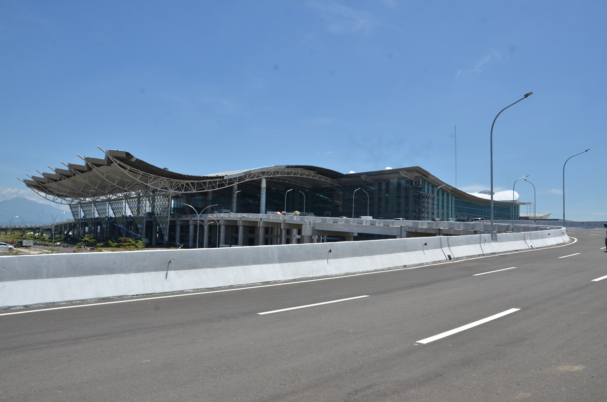 17.04.2018 Peninjauan Bandara Internasional Jawa Barat, di Kertajati, Majalengka, Jawa Barat oleh Presiden RI Joko Widodo (BKIP Kemenhub/Hari S Buyung)